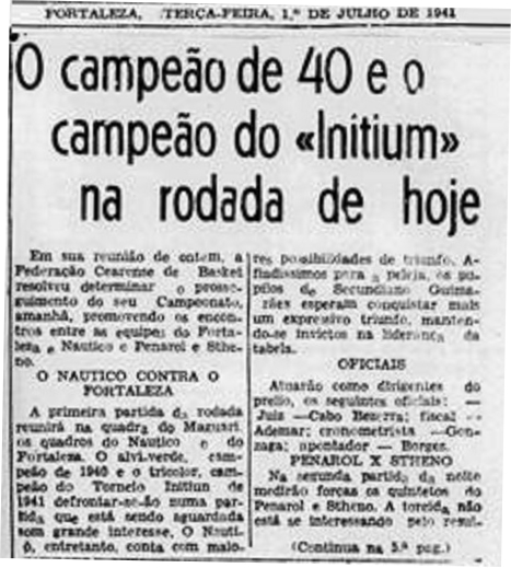 Jornal Correio do Ceará - 1 de Julho de 1941